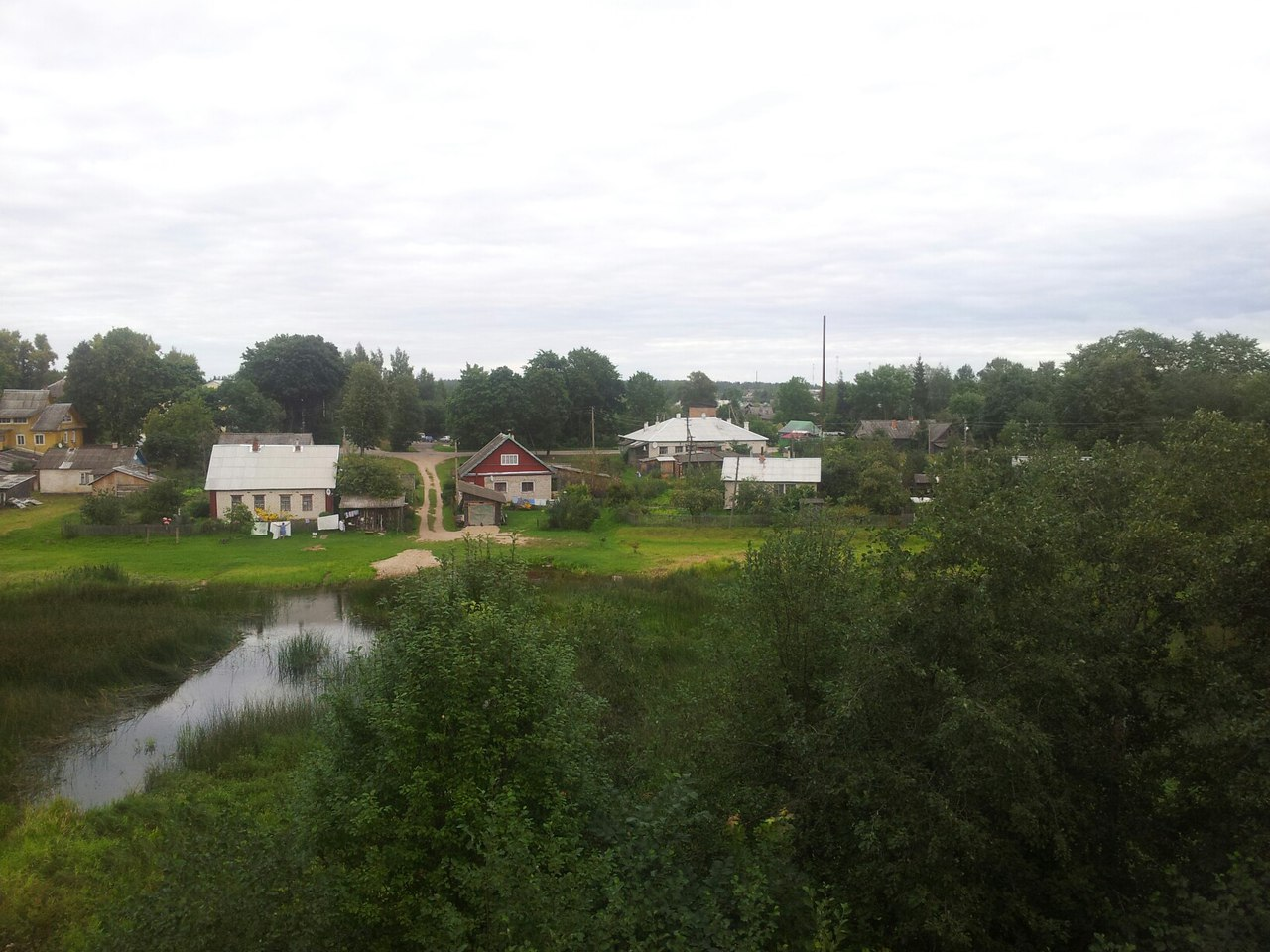 Вид на р. Синяя и пгт Красногородск с валов городища